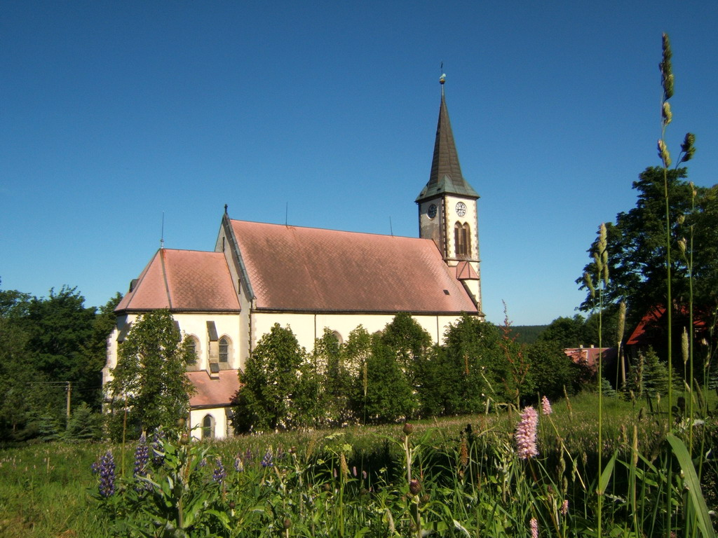 Kirche in Nové Zvolání (Neugeschrei) im Erzgebirge